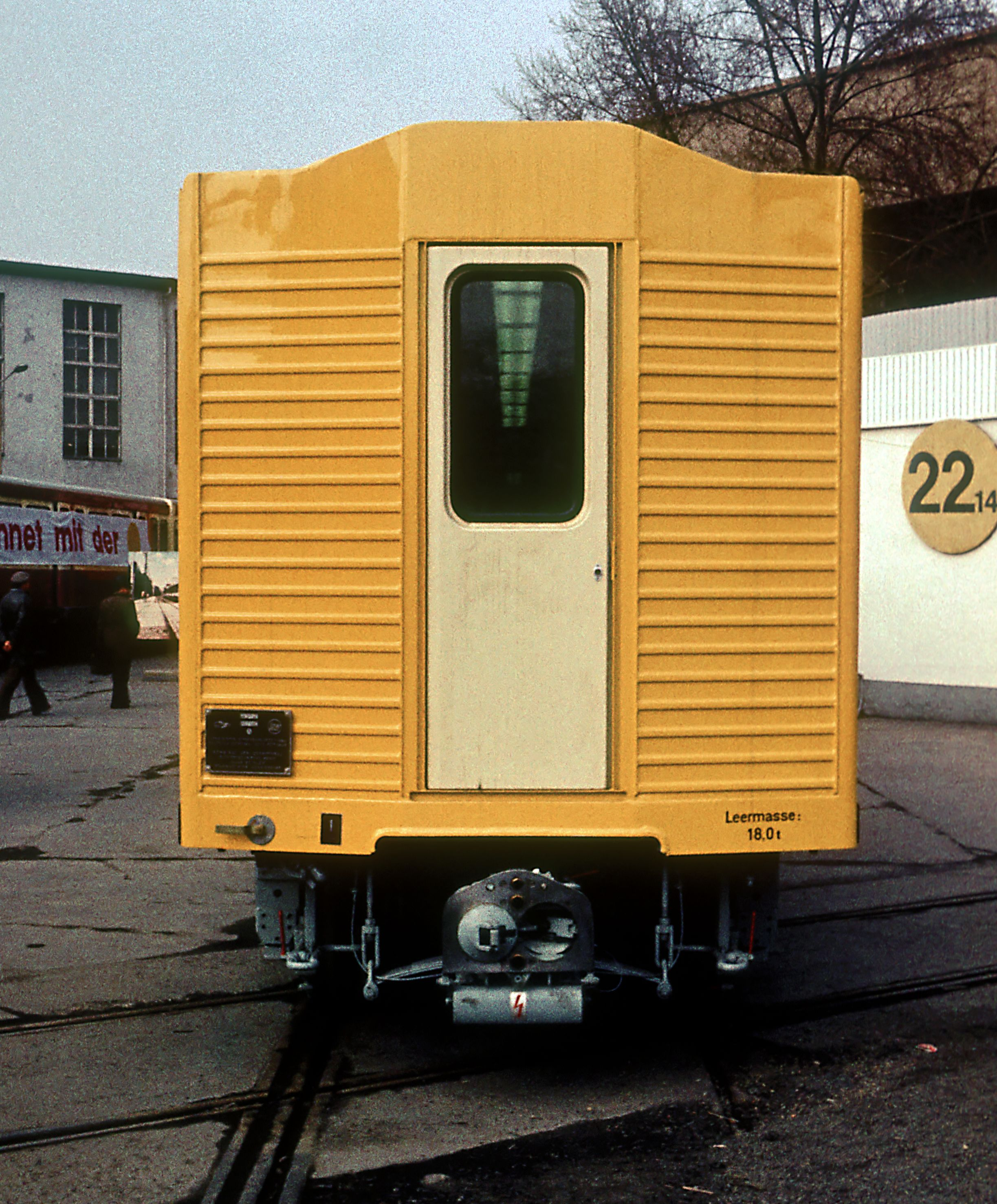 Stirnwand mit Übergangstür zur Räumung von an Engstellen stehenden Fahrzeugen. Leipziger Frühjahrsmesse 1980